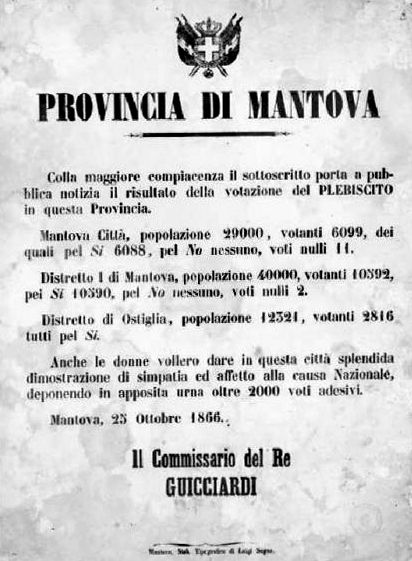 Pubblicazione dei risultati del plebiscito per la provincia di Mantova il 25 ottobre 1866